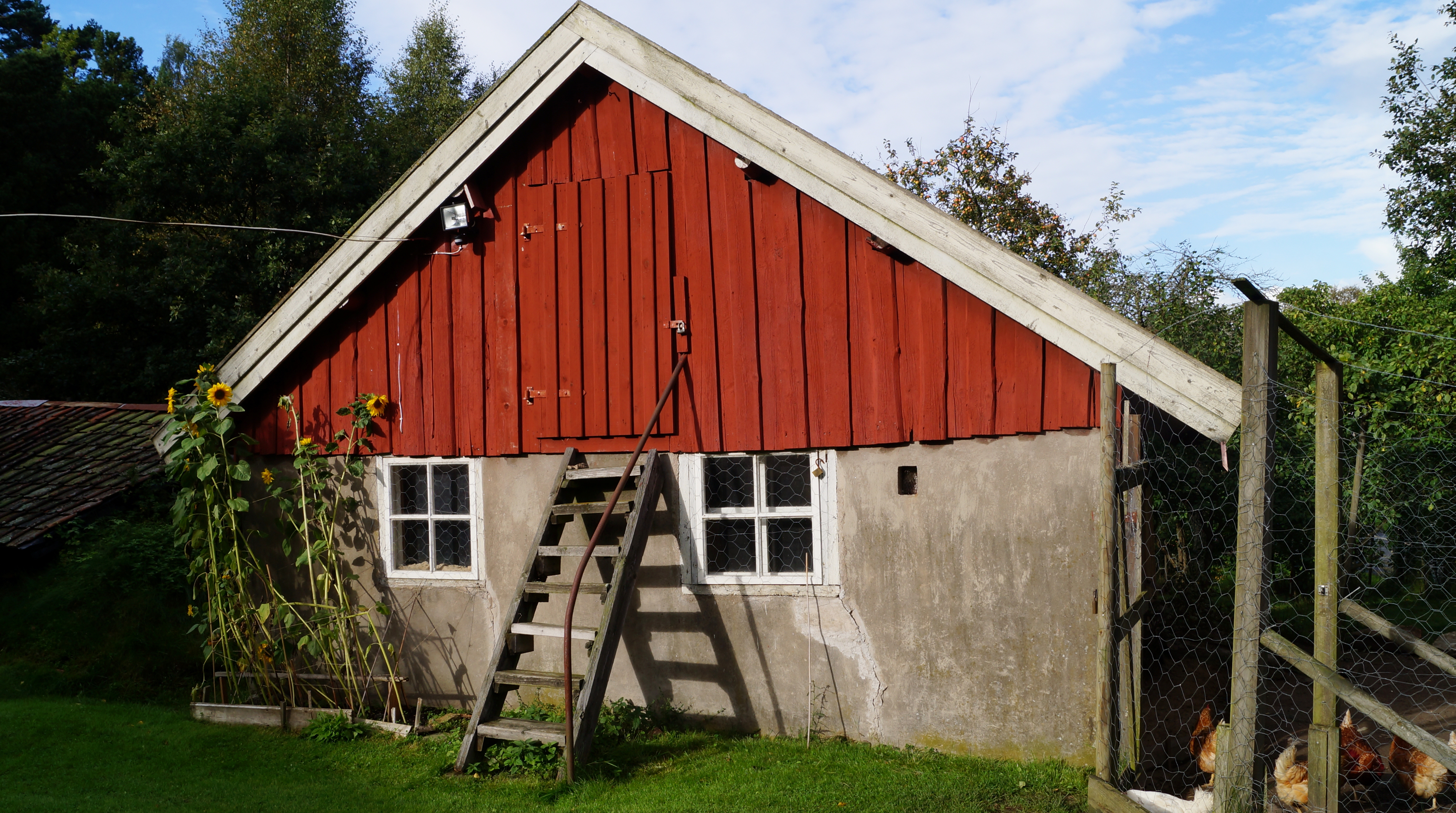 Torpet Klara ( Biskopsgården830:902) Torp Dagsverkstorp 5 Byggnader